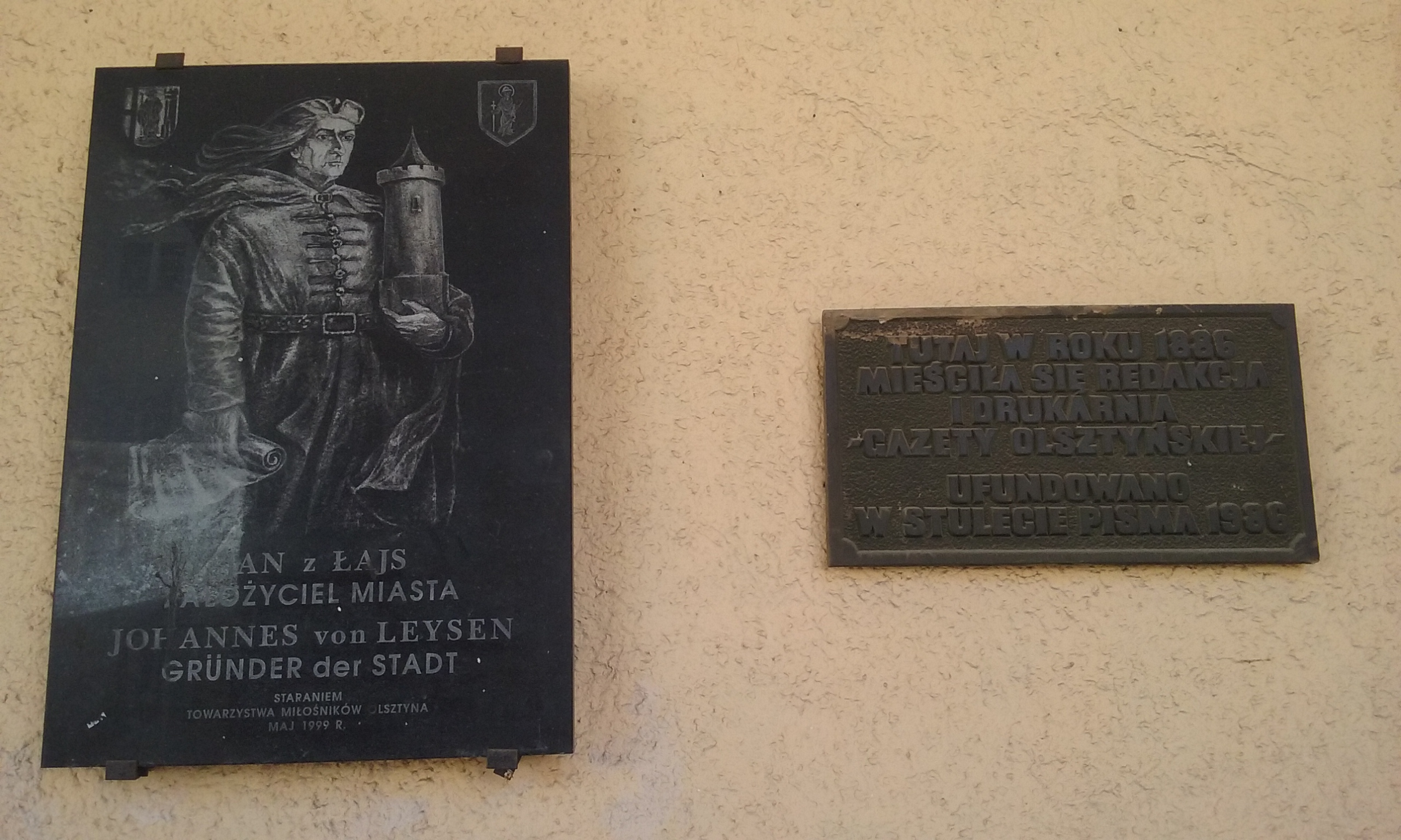 Tablice zawieszone w podcieniach Domu Burmistrza w Olsztynie